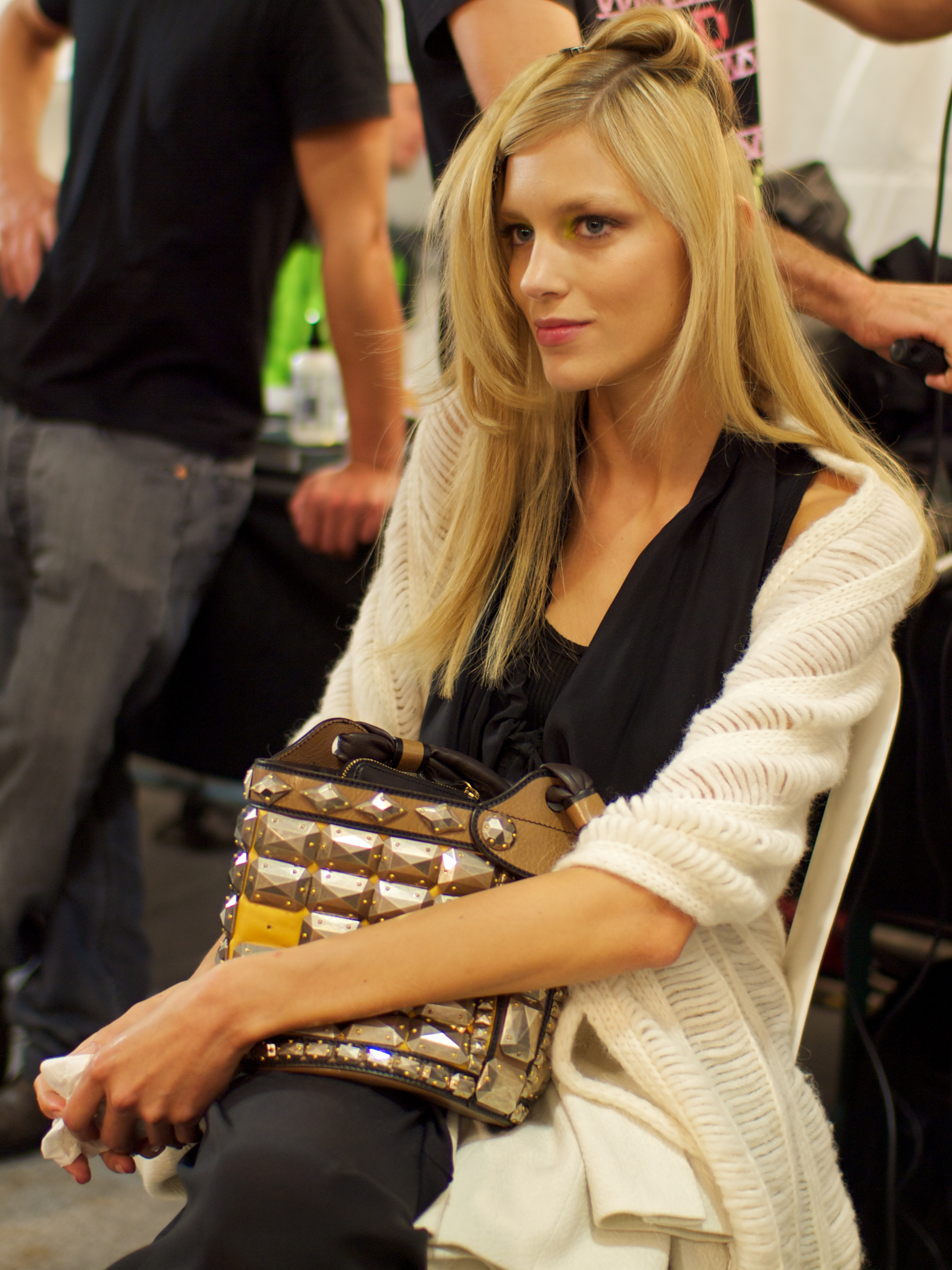 Backstage Elie Saab prêt-à-porter printemps-été 2011